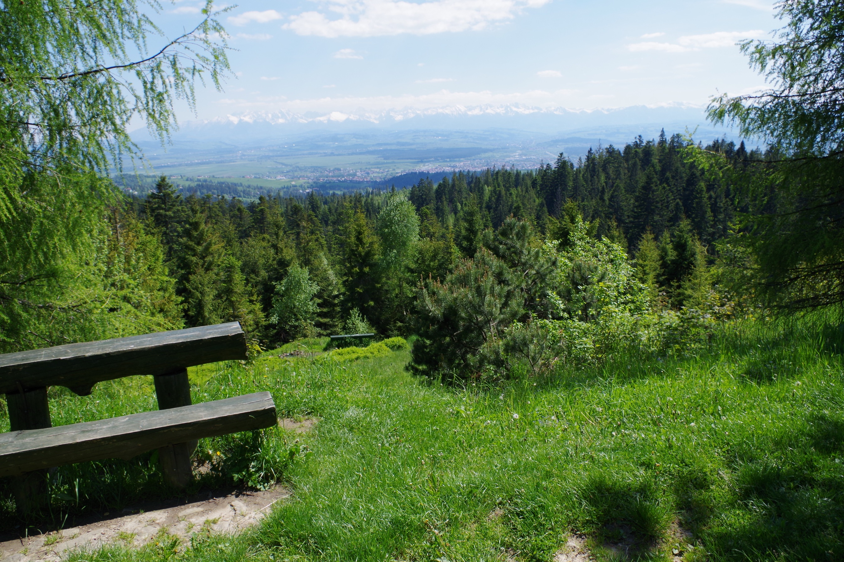 Polana Łapsowa Niżna